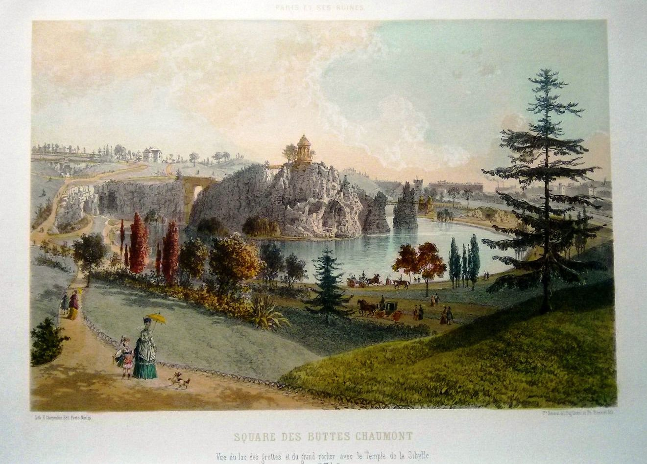 Lithographie colorisée tirée de "Paris et ses ruines", représentant le "Square des Buttes Chaumont", aujourd'hui Parc des Buttes-Chaumont.